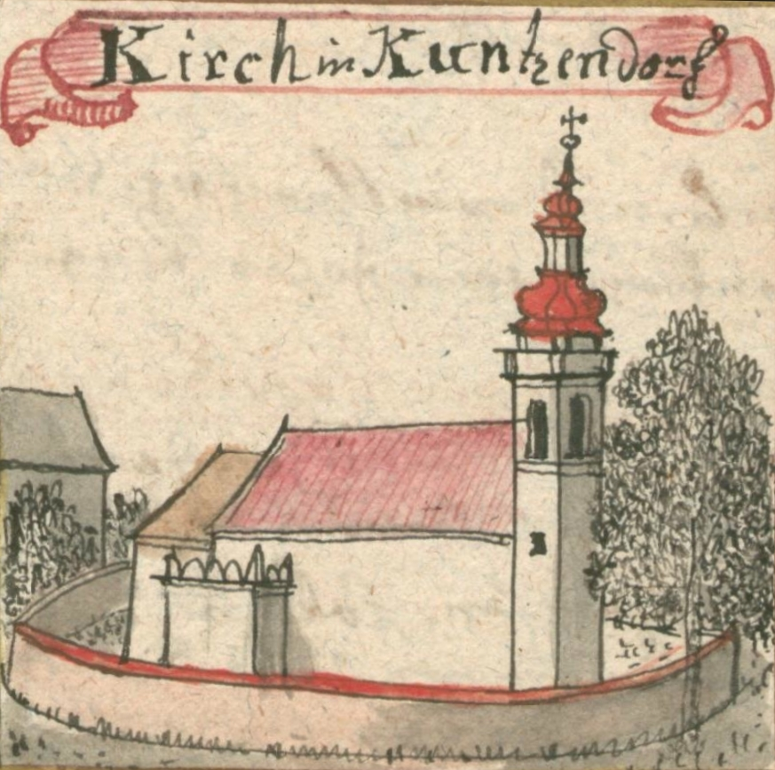 Kirch zu Kunzendorf